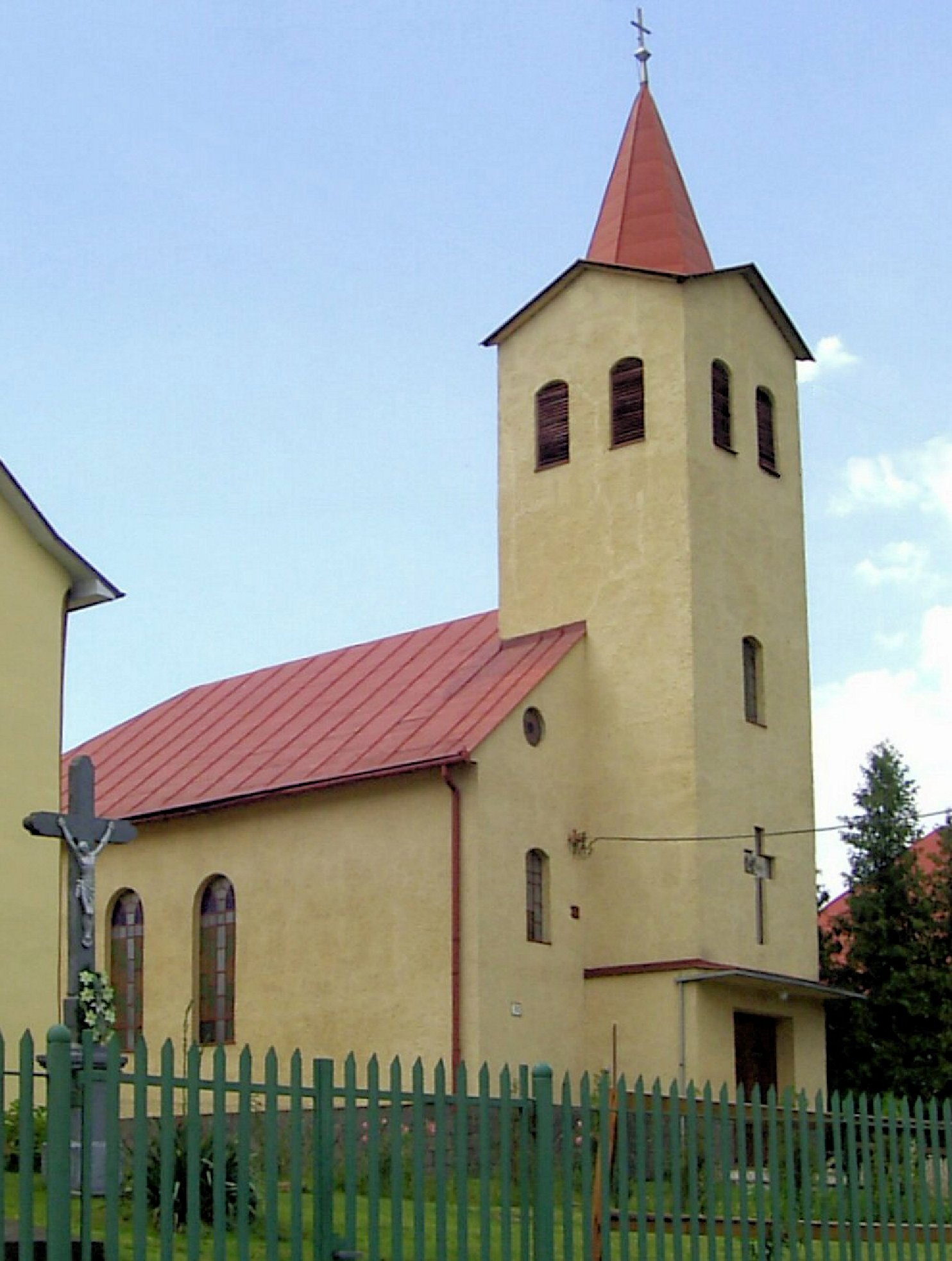 Čierne nad Topľou, evangelický kostol